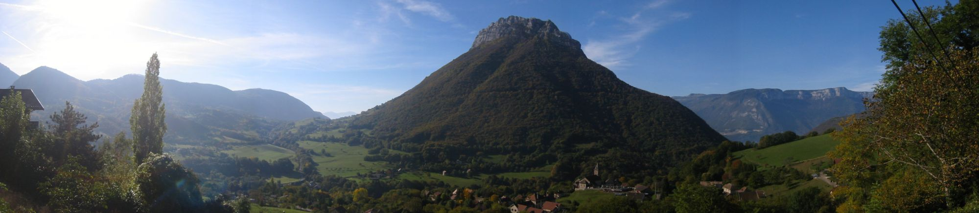 Panorama de Quaix en Chartreuse (centre village avec l'église) face au Néron. Photo prise depuis le hameau de La Jars. À gauche, le mont Rachais. À droite, les falaises Nord du massif du Vercors.